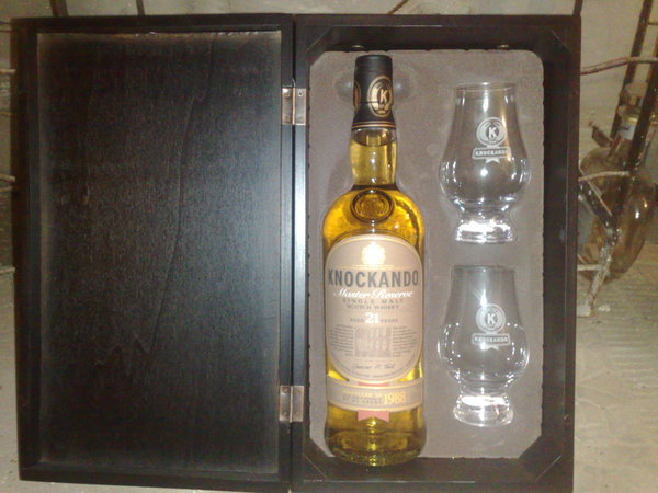 Coffret dégustation Knockando 21ans